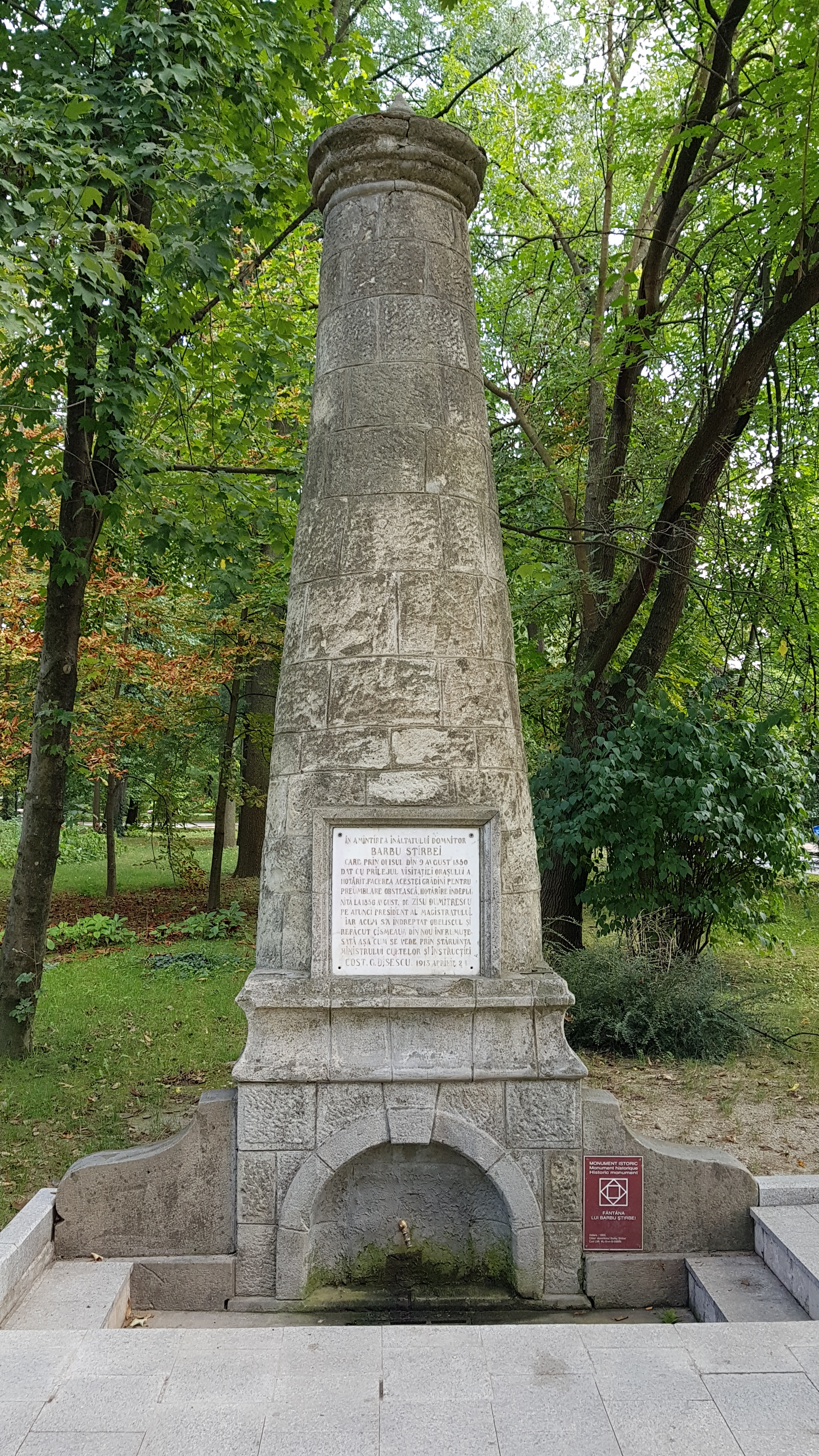 Fântâna Știrbei. - municipiul Râmnicu Vâlcea, Parcul Zăvoi